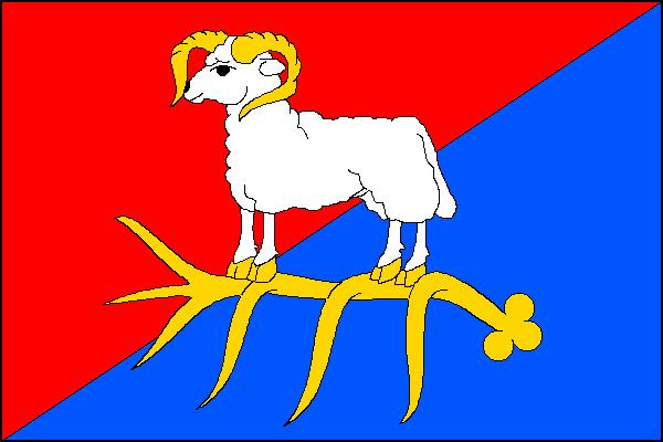 Vlajka české obce Blížejov